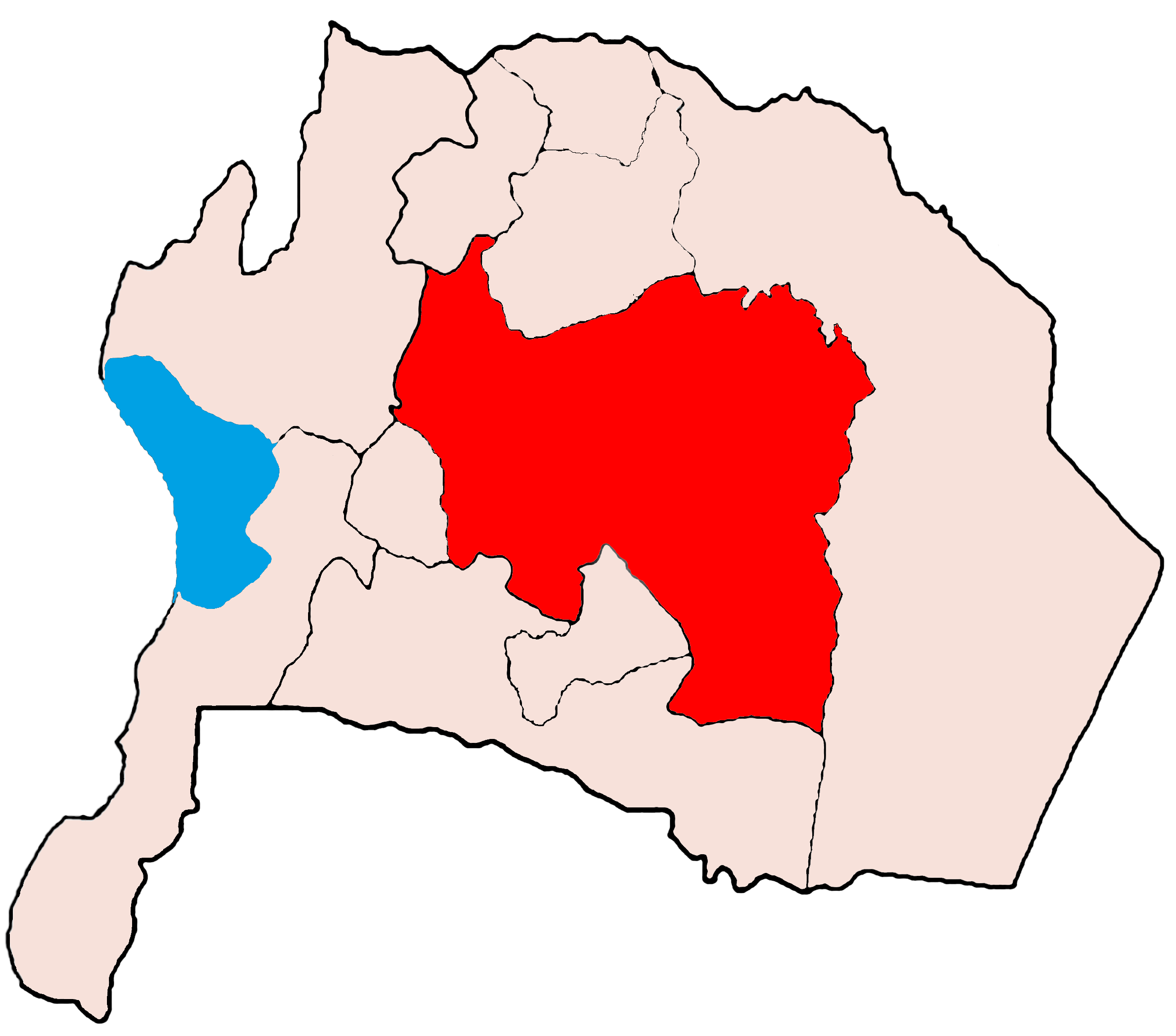 Maps of Karak — Karak-Qasabat Karak User:Tarawneh/rami